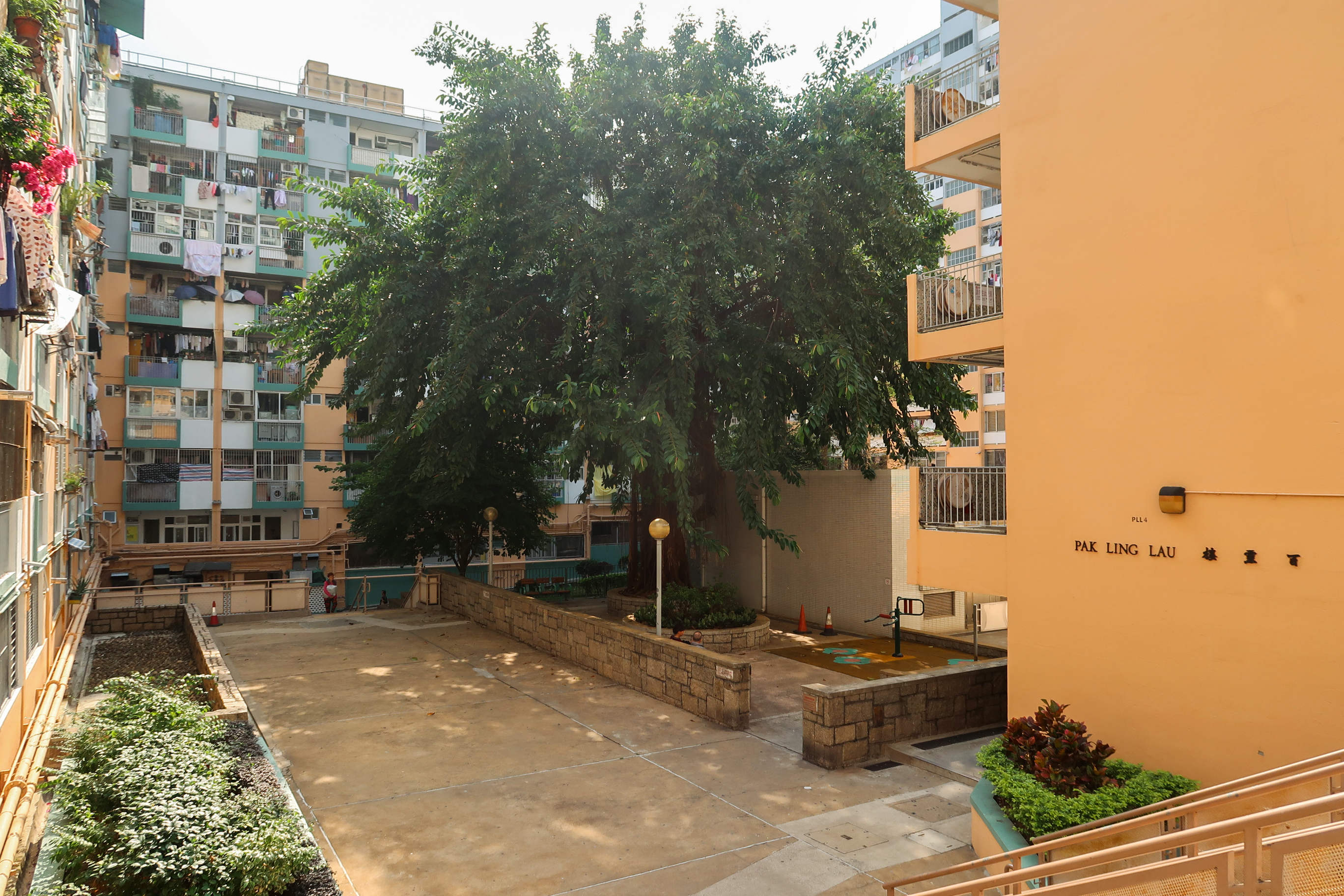 Kwun Tong Garden Estate Old trees